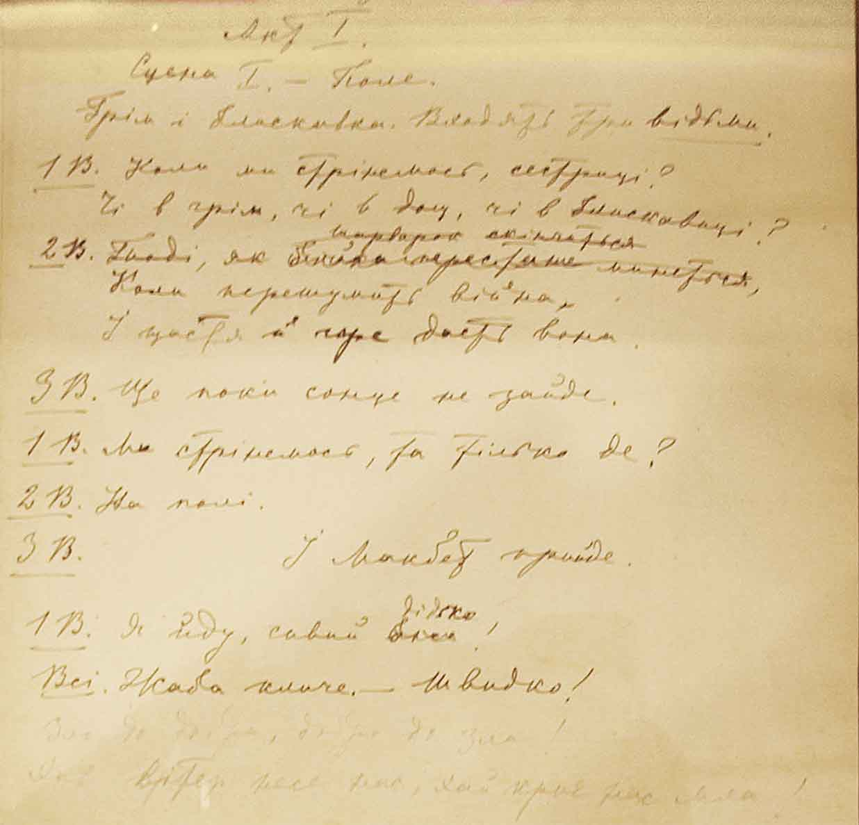 Вільям Шекспір "Макбет". Фрагмент перекладу Лесі Українки, 1898